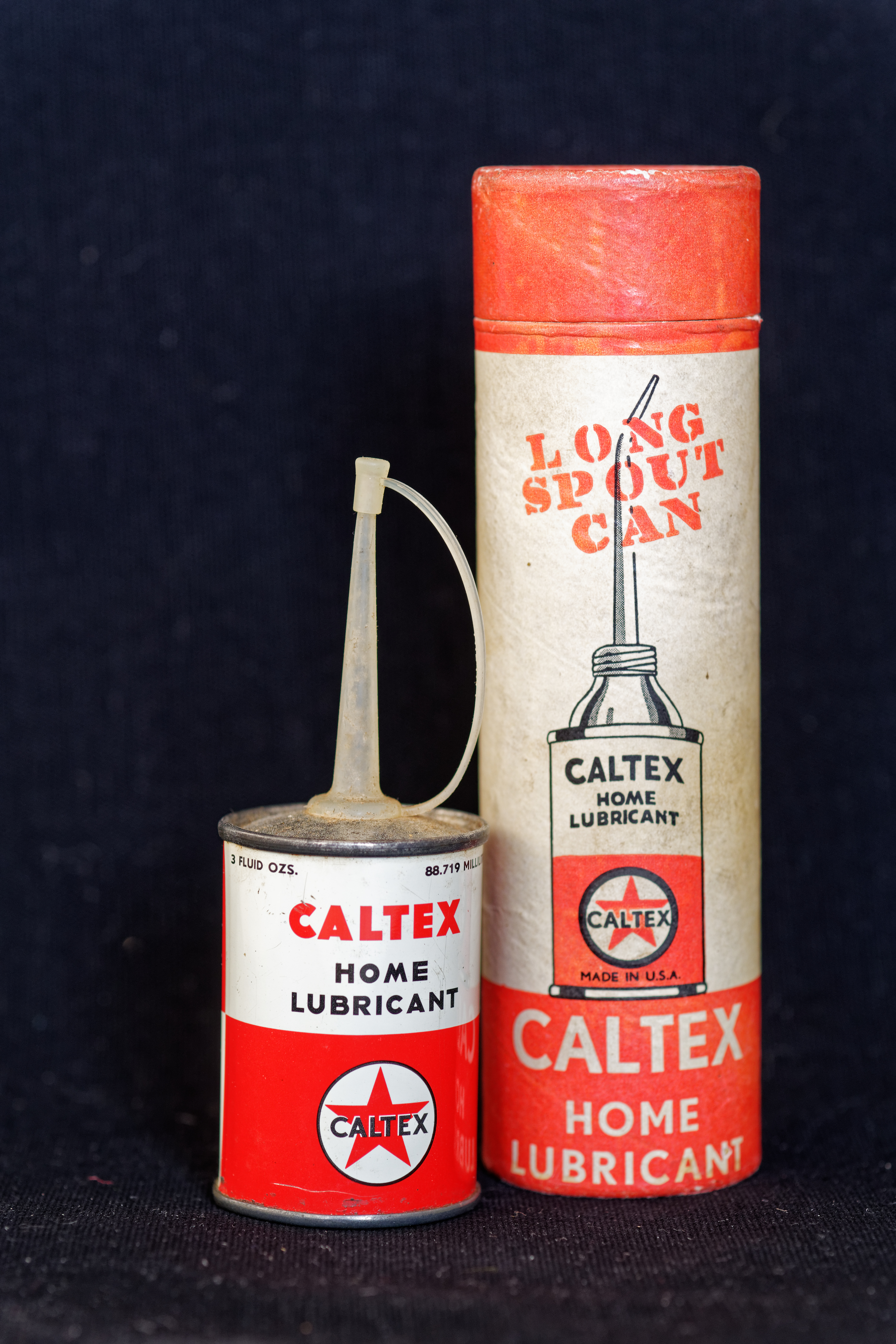 Caltex home lubricant